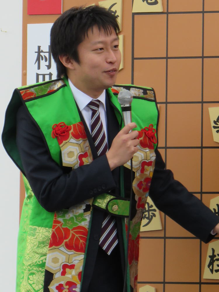 将棋棋士の船江恒平（平成27年11月28日、姫路市で行われた人間将棋にて）